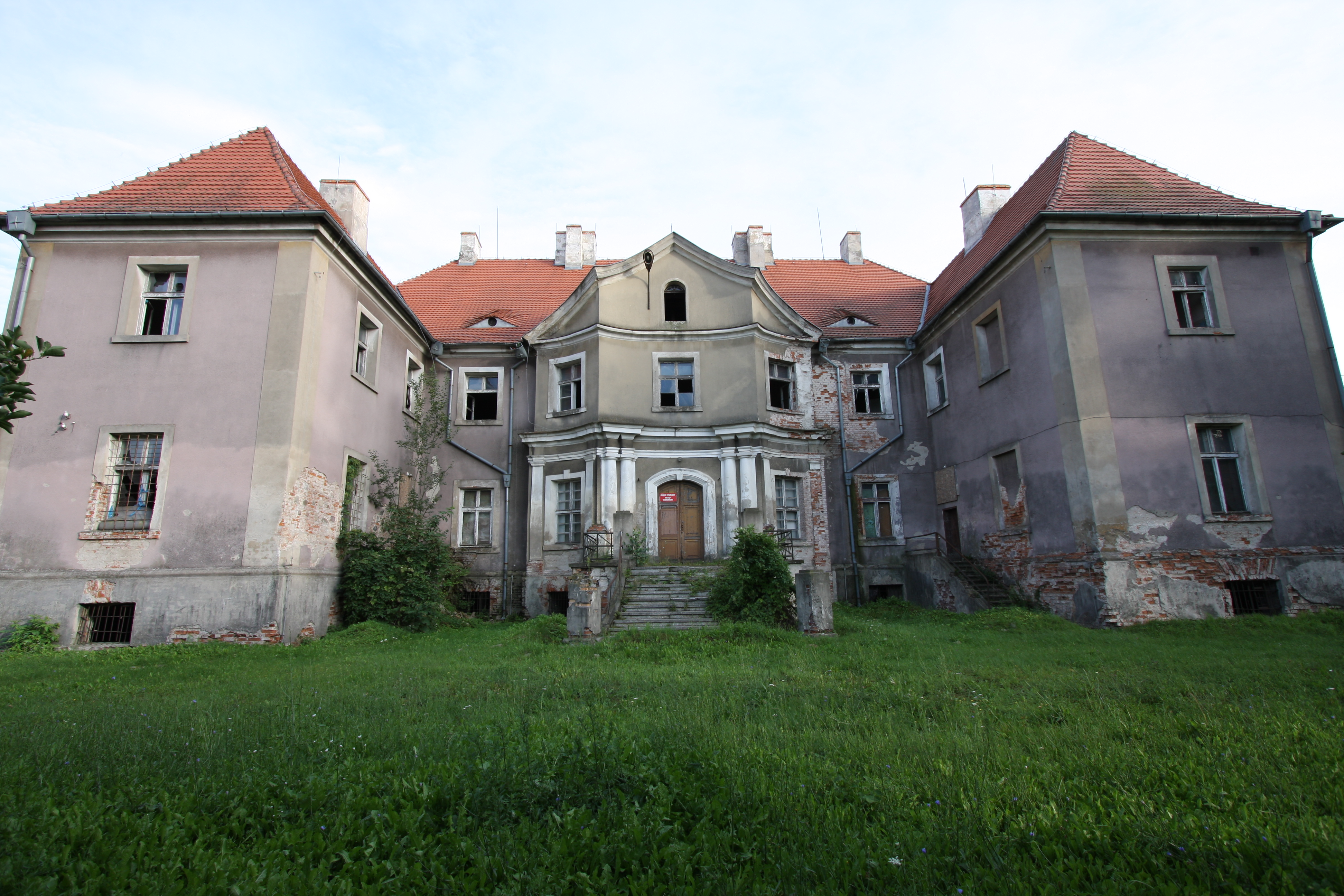 Kargowa, pałac, mur., 1731 (zabytek nr rejestr. 1004)